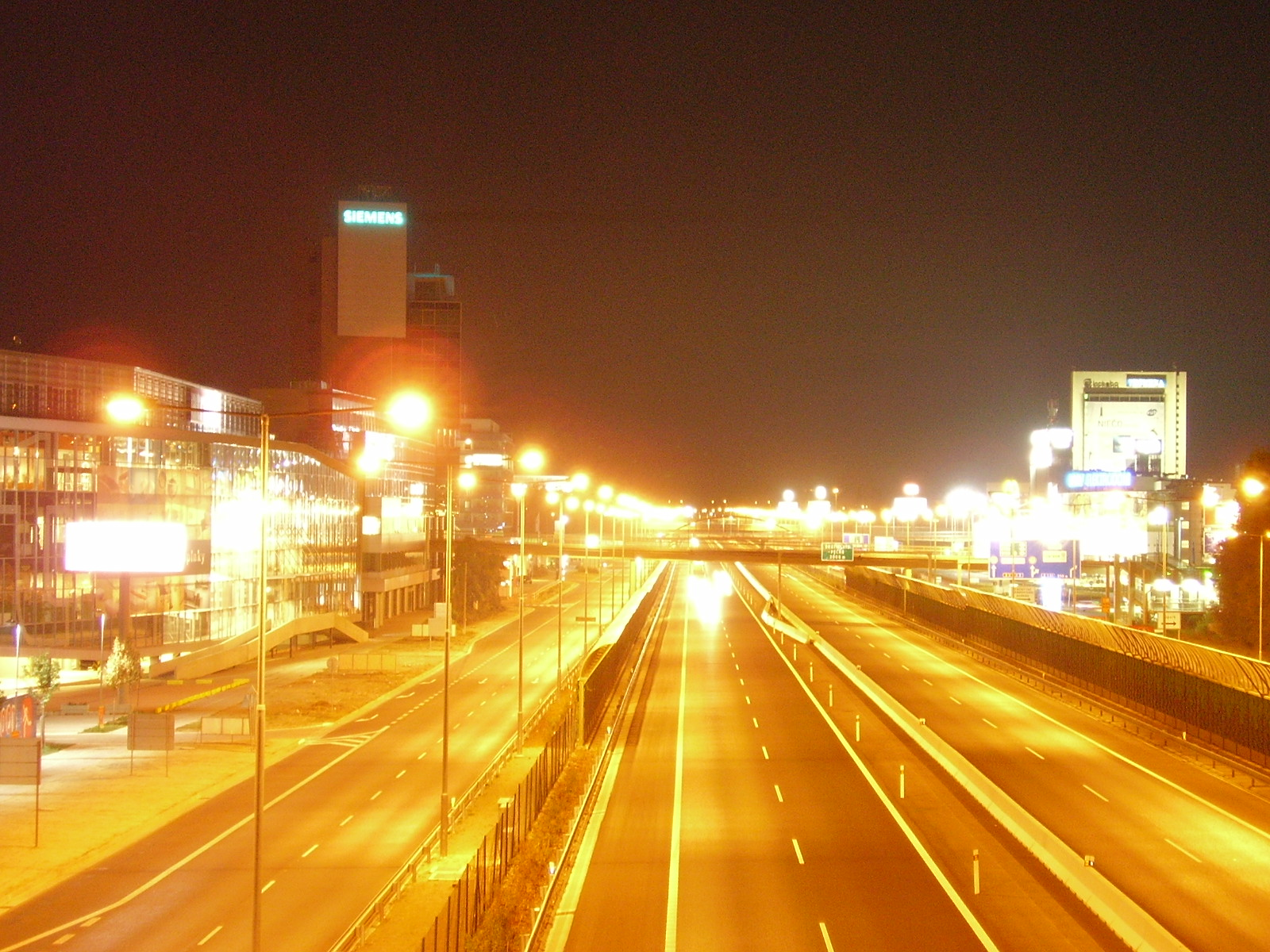 Einsteinova highway, Bratislava, Slovakia